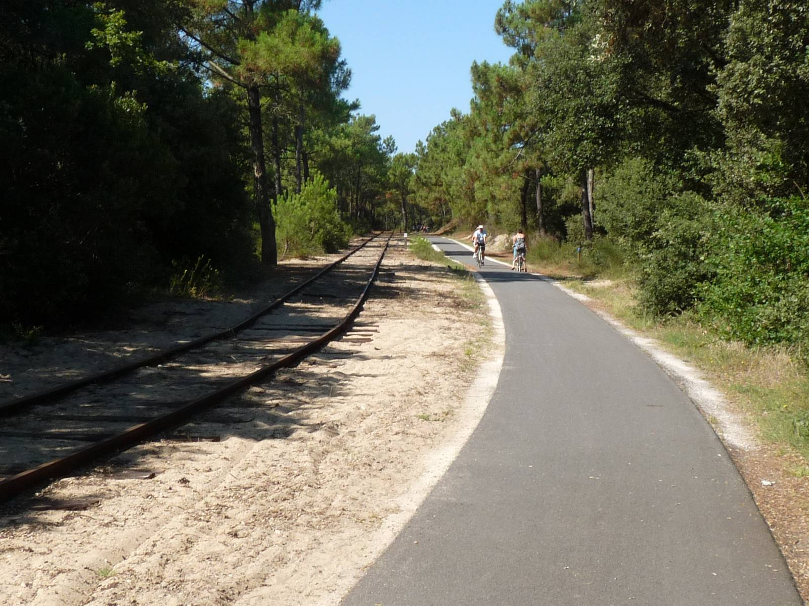 piste cyclable de la Pointe de Grave, France; et voie ferrée touristique